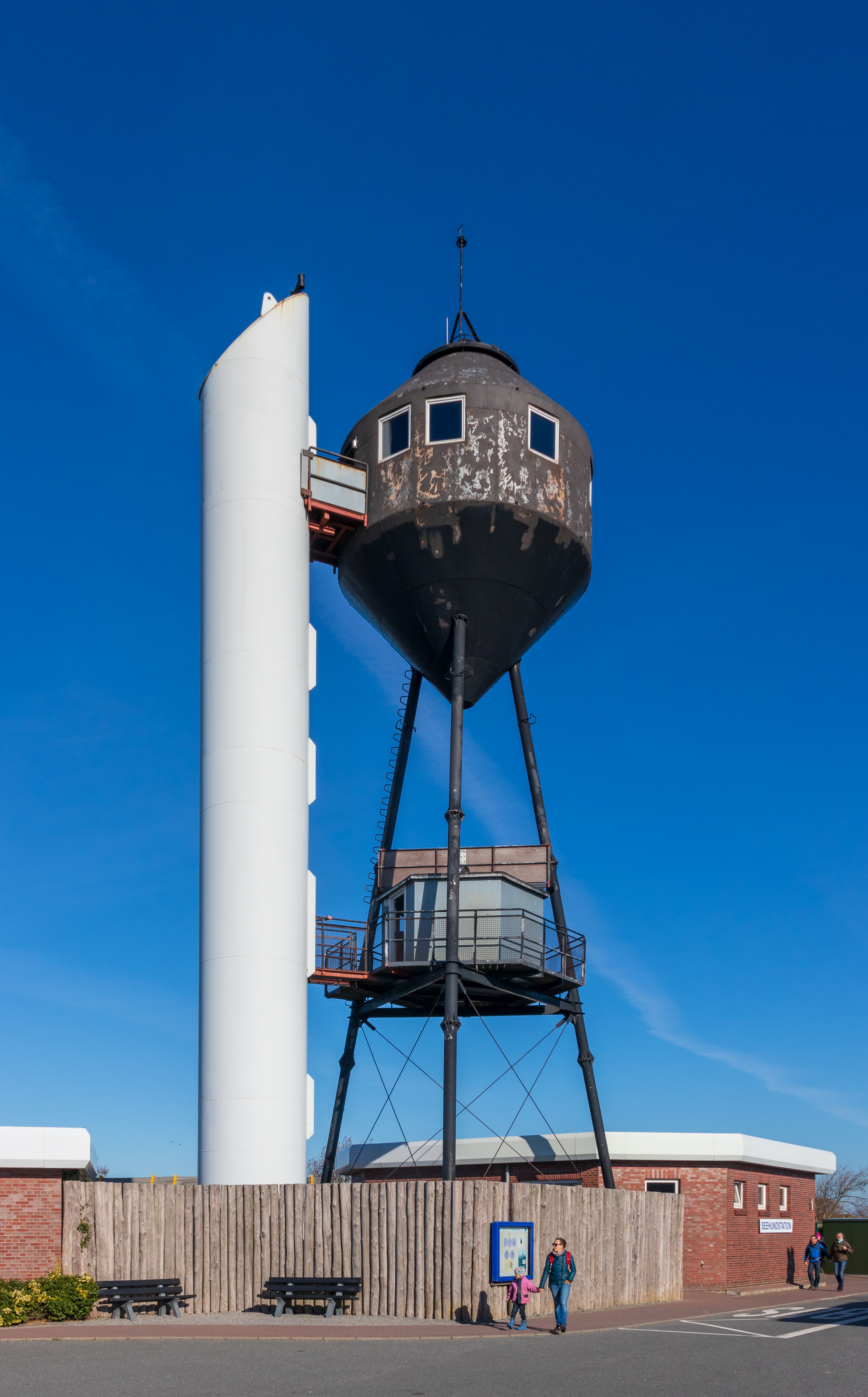 Trischenbake